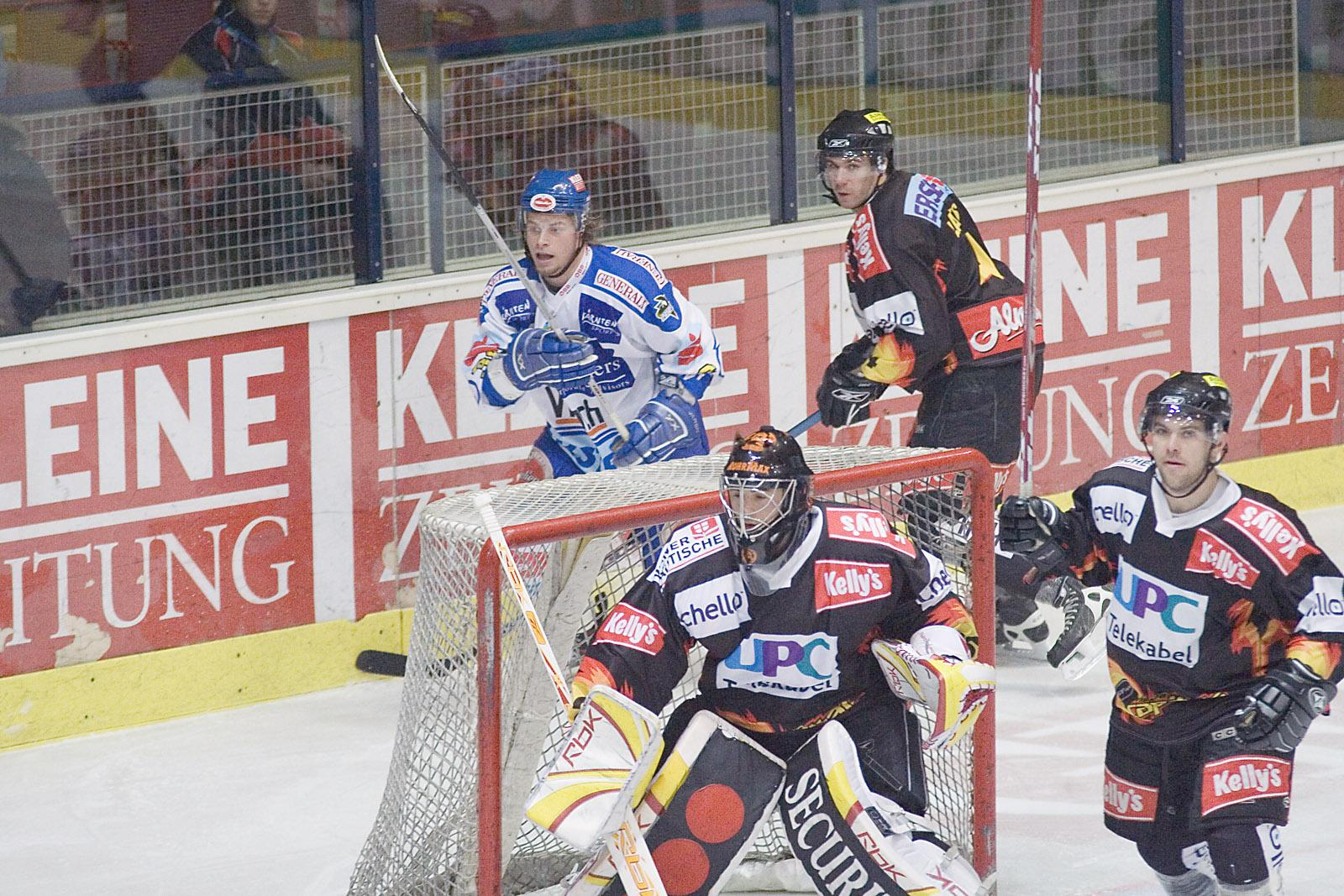 Spieler der Capitals beim Auswärtsspiel gegen den EC VSV